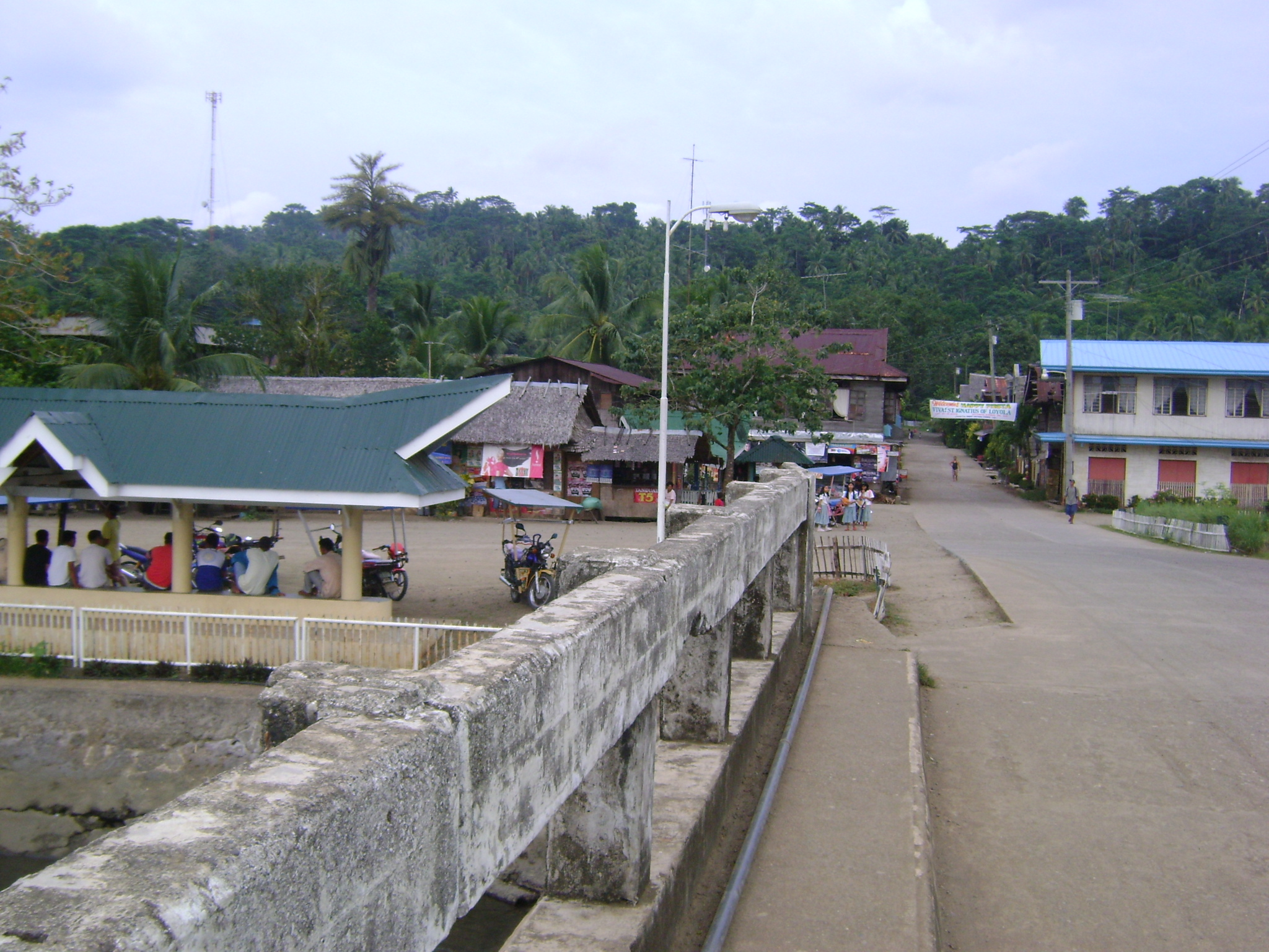 Bayabas, Surigao del Sur